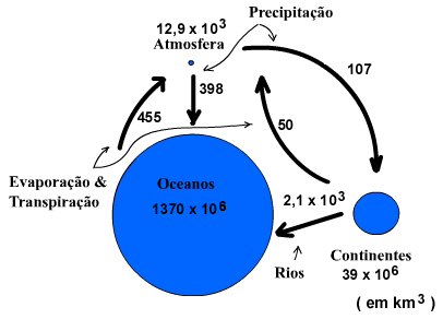 Hidrologic cycle - Figura com ciclo hidrológico